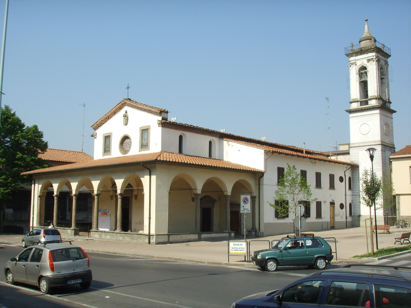 Prato, santa maria del soccorso 01